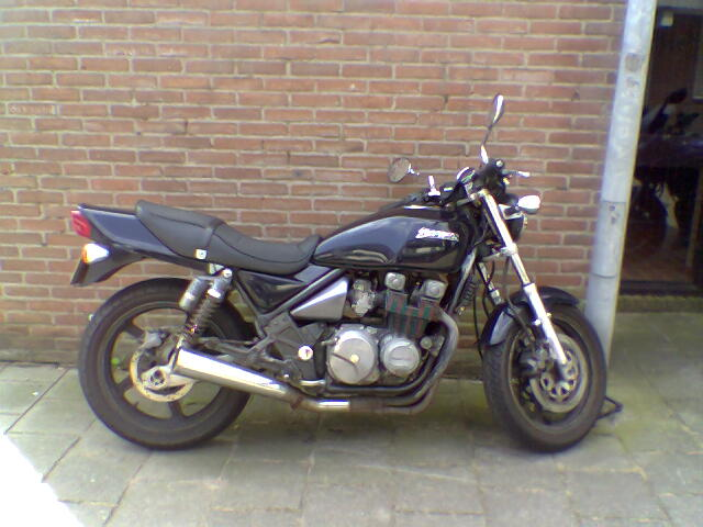 De Kawasaki Zephyr 550 is een voorbeeld van een Naked bike. Kawasaki Zephyr 550.